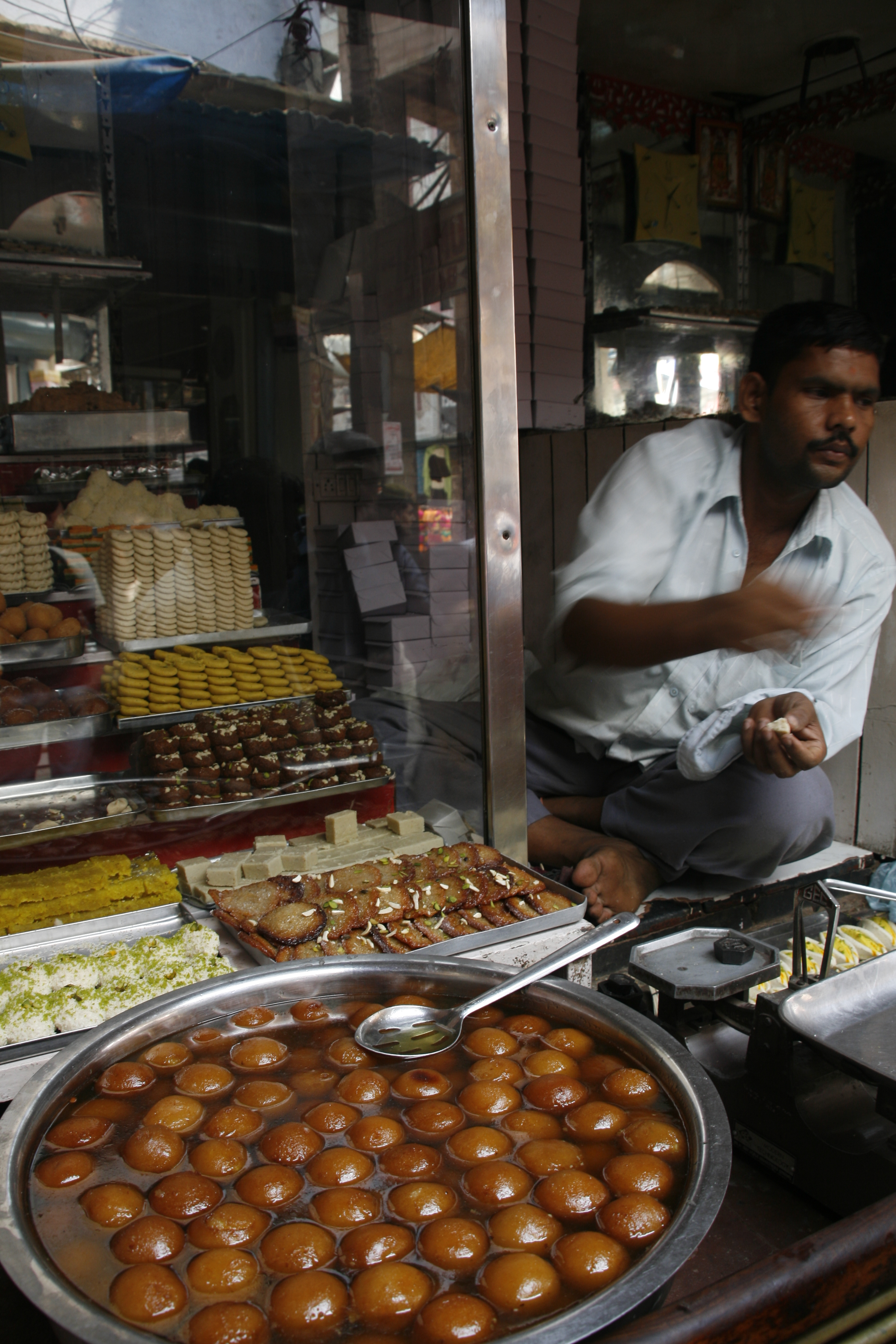 Indian sweet shop in varanasi